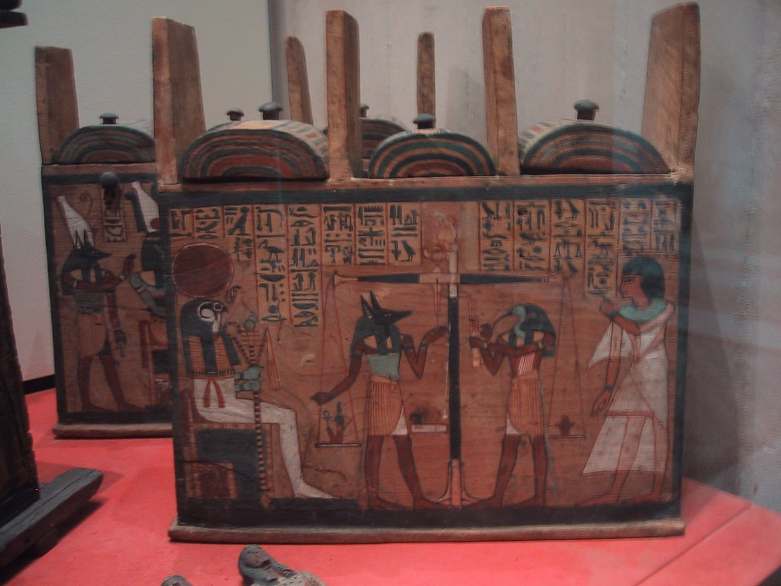 Coffres à serviteurs funéraires de Tchaouenhouy.